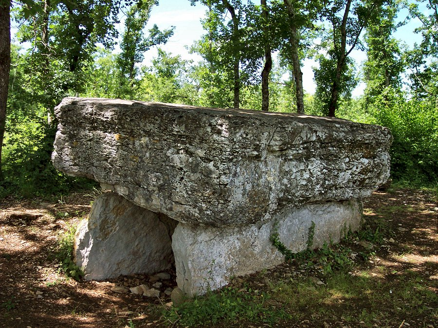 Dolmen d'Agranel ou du Lac d'Aurié